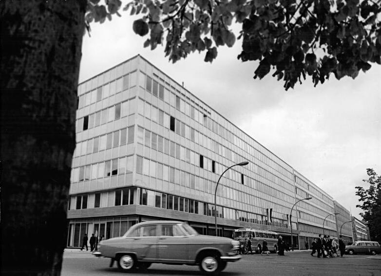 Berlin, Ungarische Botschaft Zentralbild Spremberg sua-zi 4.10.1966 Berlin: Neues ungarisches Botschaftsgebäude Unter den Linden Symbol der Freundschaft zwischen der DDR und Ungarn. Die Übergabe erfolgte am 30.9.1966 an den Botschafter der Ungarischen Volksrepublik József Kárpáti.